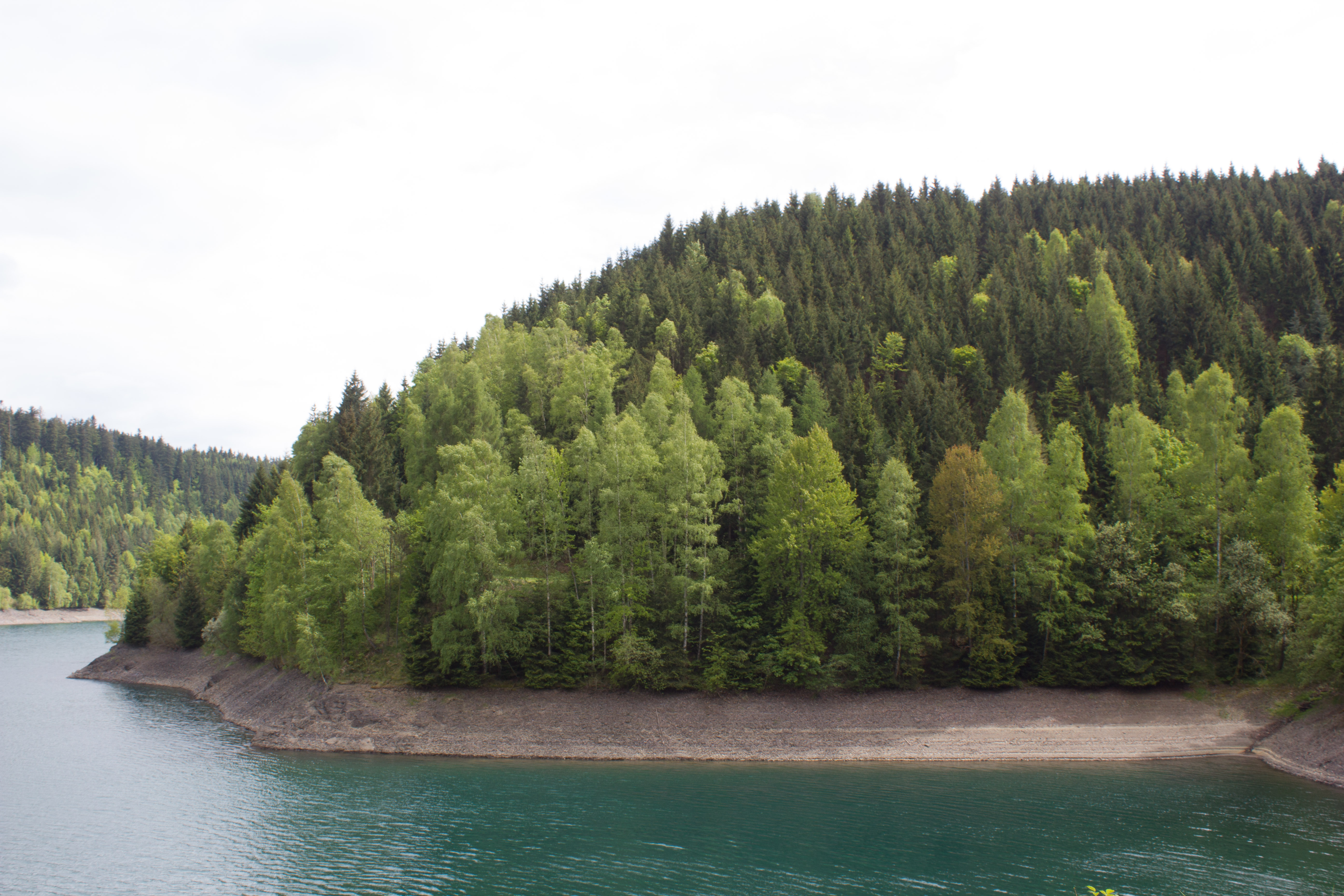 Ködeltalsperre im Naturpark Frankenwald